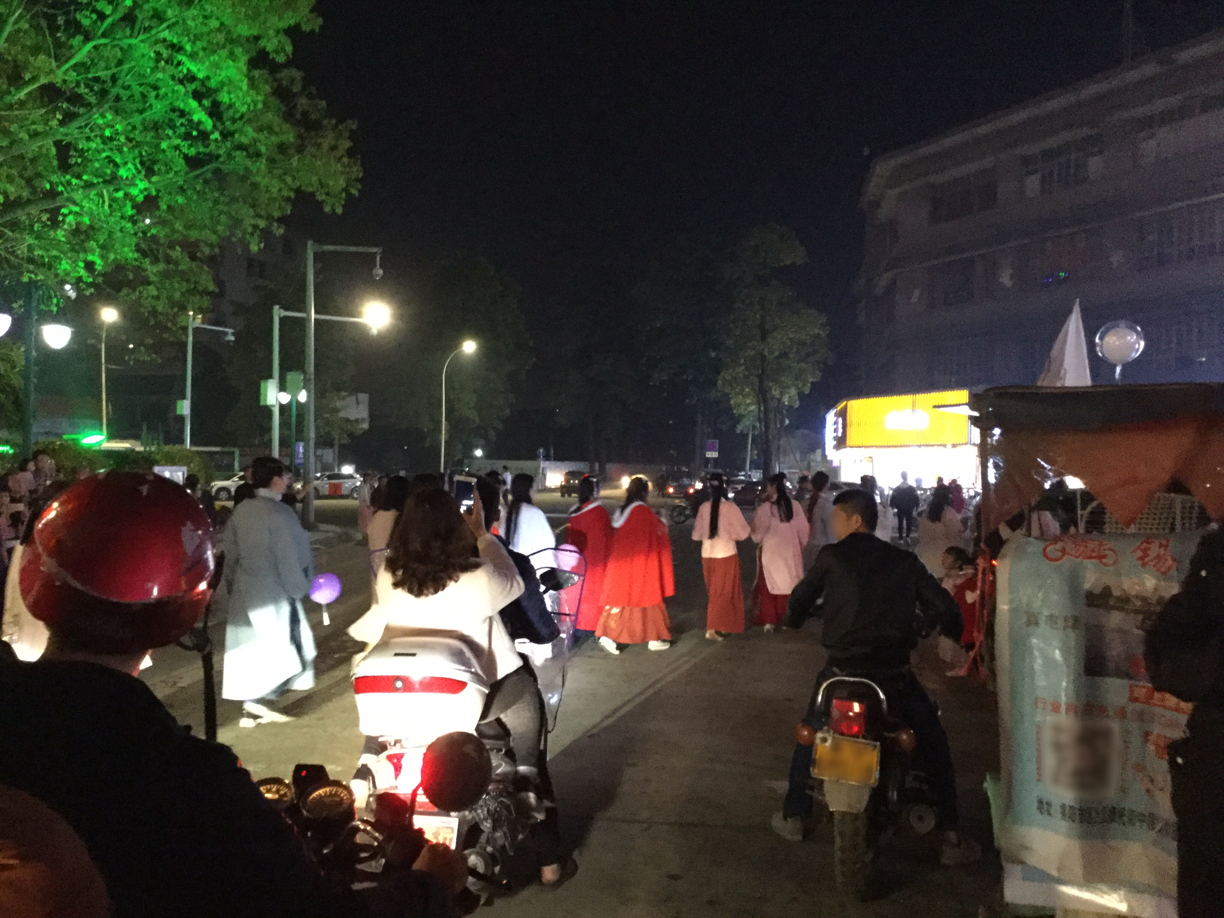 进贤门城楼，2019年元宵节